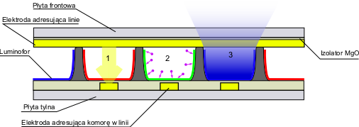 Schemat budowy ekranu plazmowego. Autor: Seweryn Niemiec. Program: Sodipodi. Data: 2003-11-02